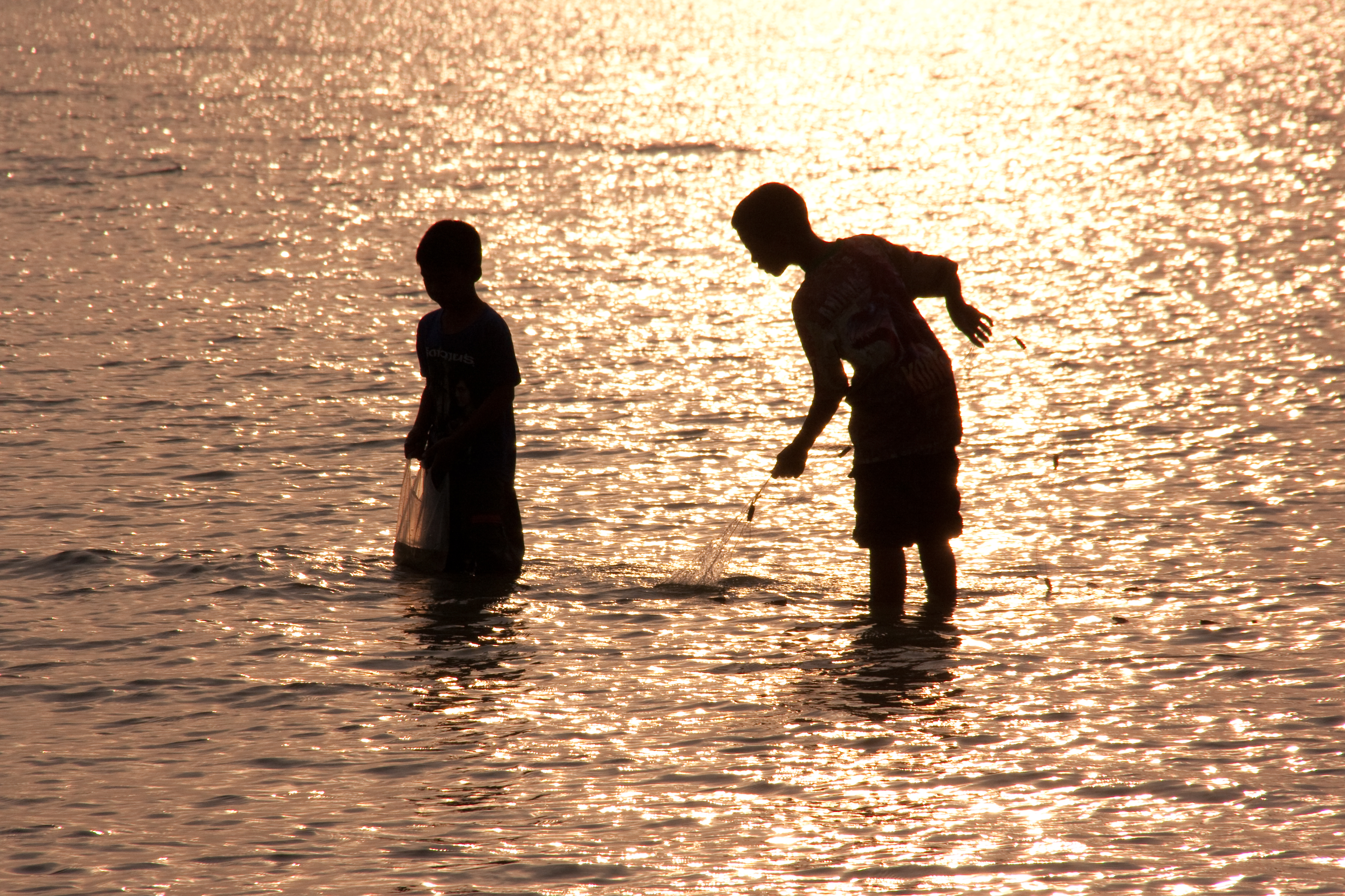 Kinder beim Fischen in Nathon - Koh Samui